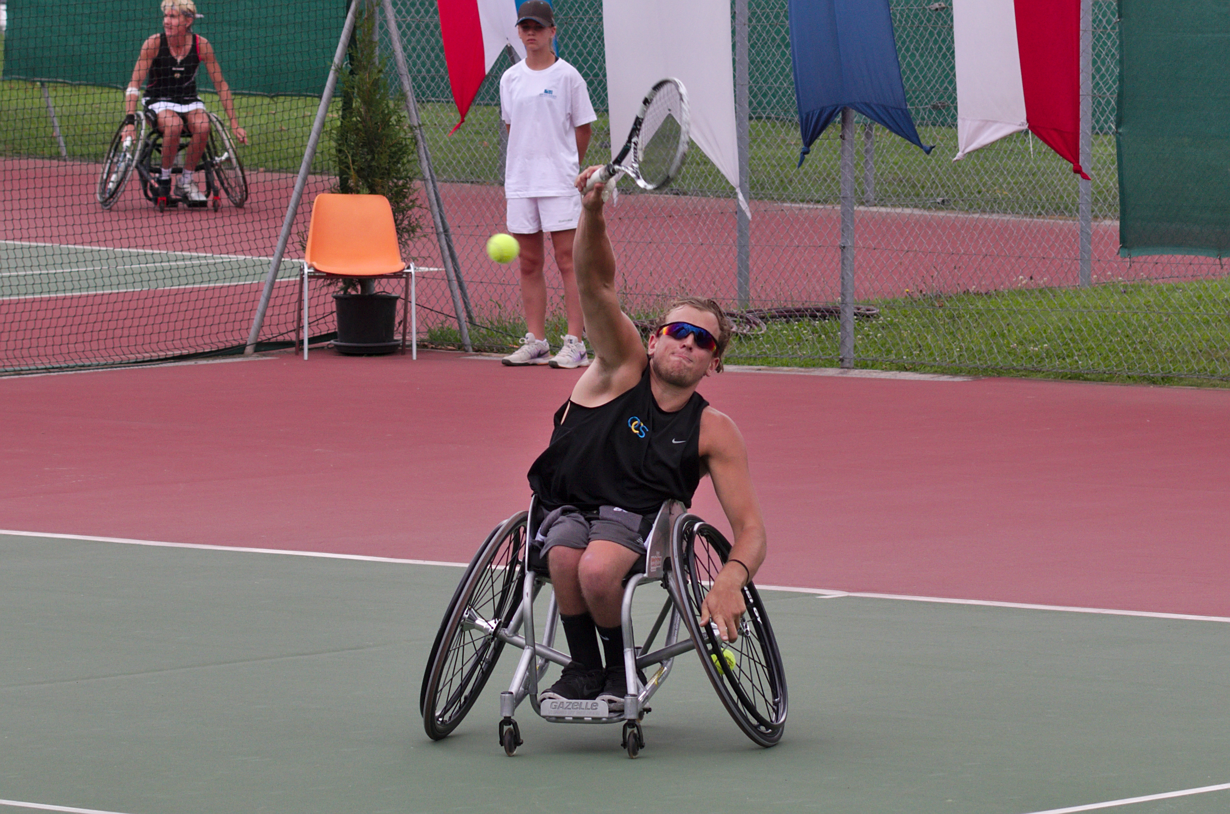 Swiss Open Geneva - 20140712 - Semi final Quad - D. Wagner vs D. Alcott